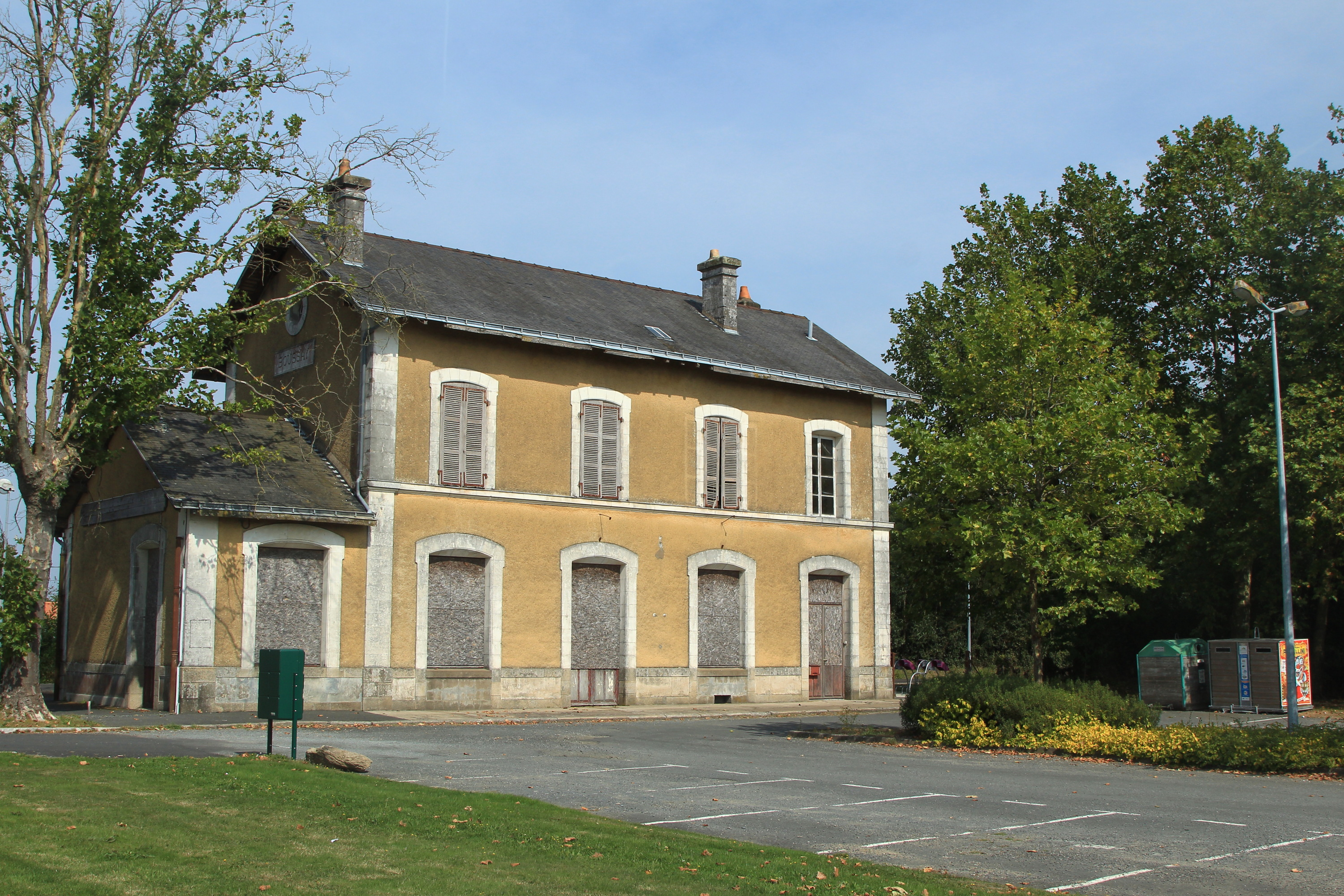 Le bâtiment voyageurs de la gare de Boussay - La Bruffière, inutilisé, vu côté cour.